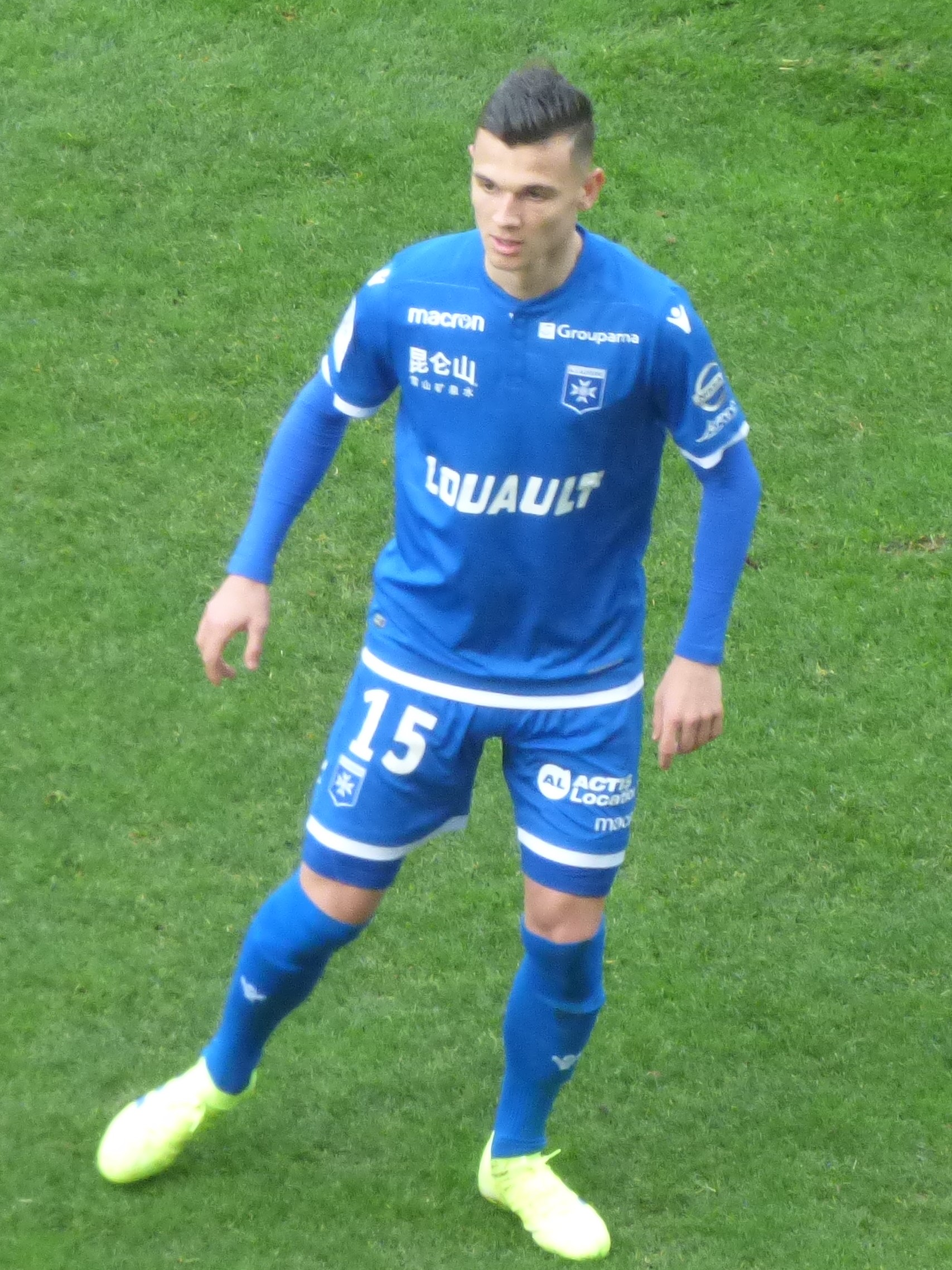 Loïc Goujon lors du match RC Lens - AJ Auxerre, comptant pour la 28ème journée du championnat de France de football de Ligue 2 2018-2019, le 9 mars 2019 au Stade Bollaert-Delelis.